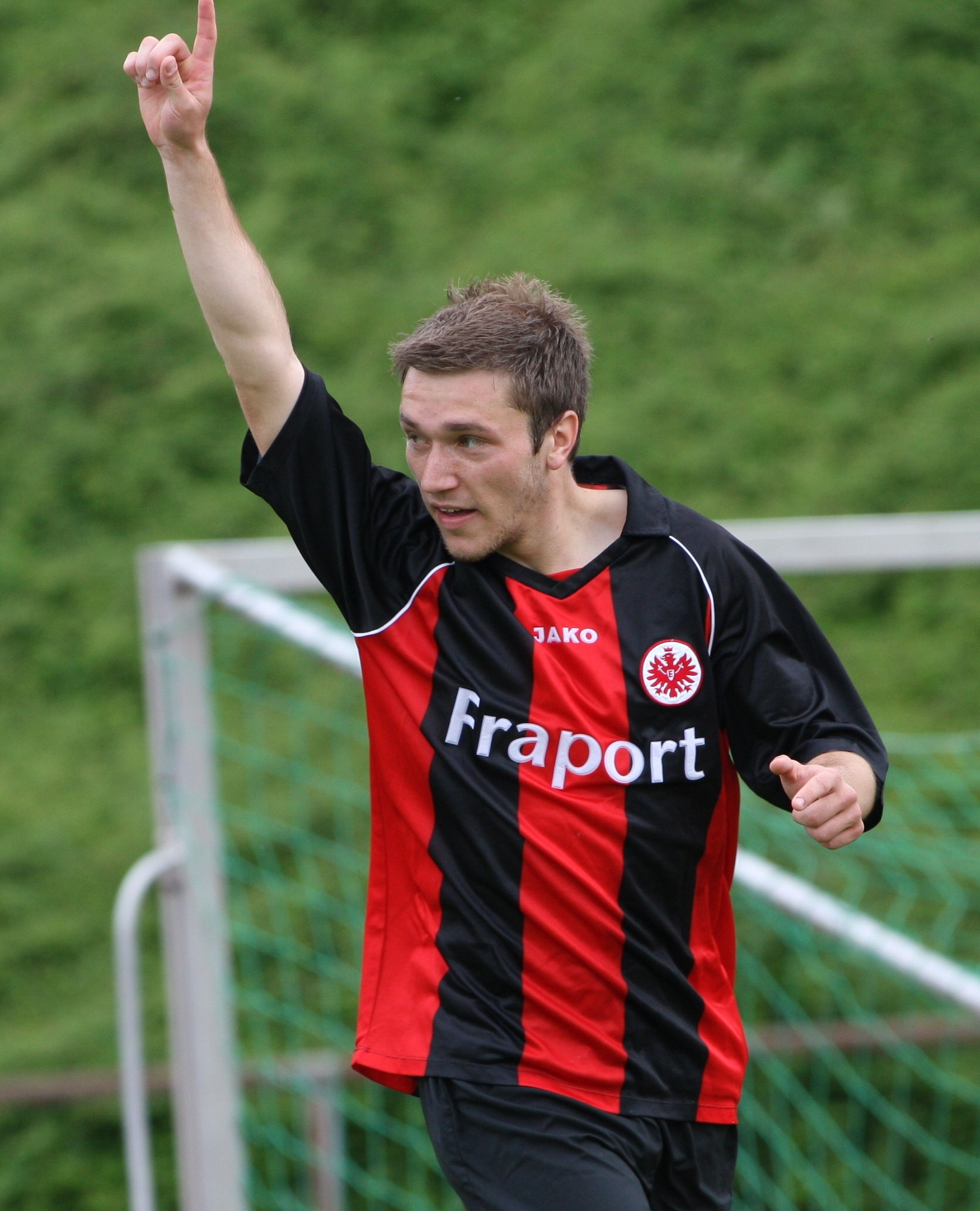 Danny Galm im Mai 2008 beim Torjübel für Eintracht Frankfurt U23